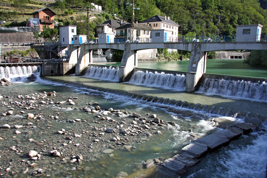 Sbarramento sul Torrente Anza a Piedimulera, al termine della Valle Anzasca